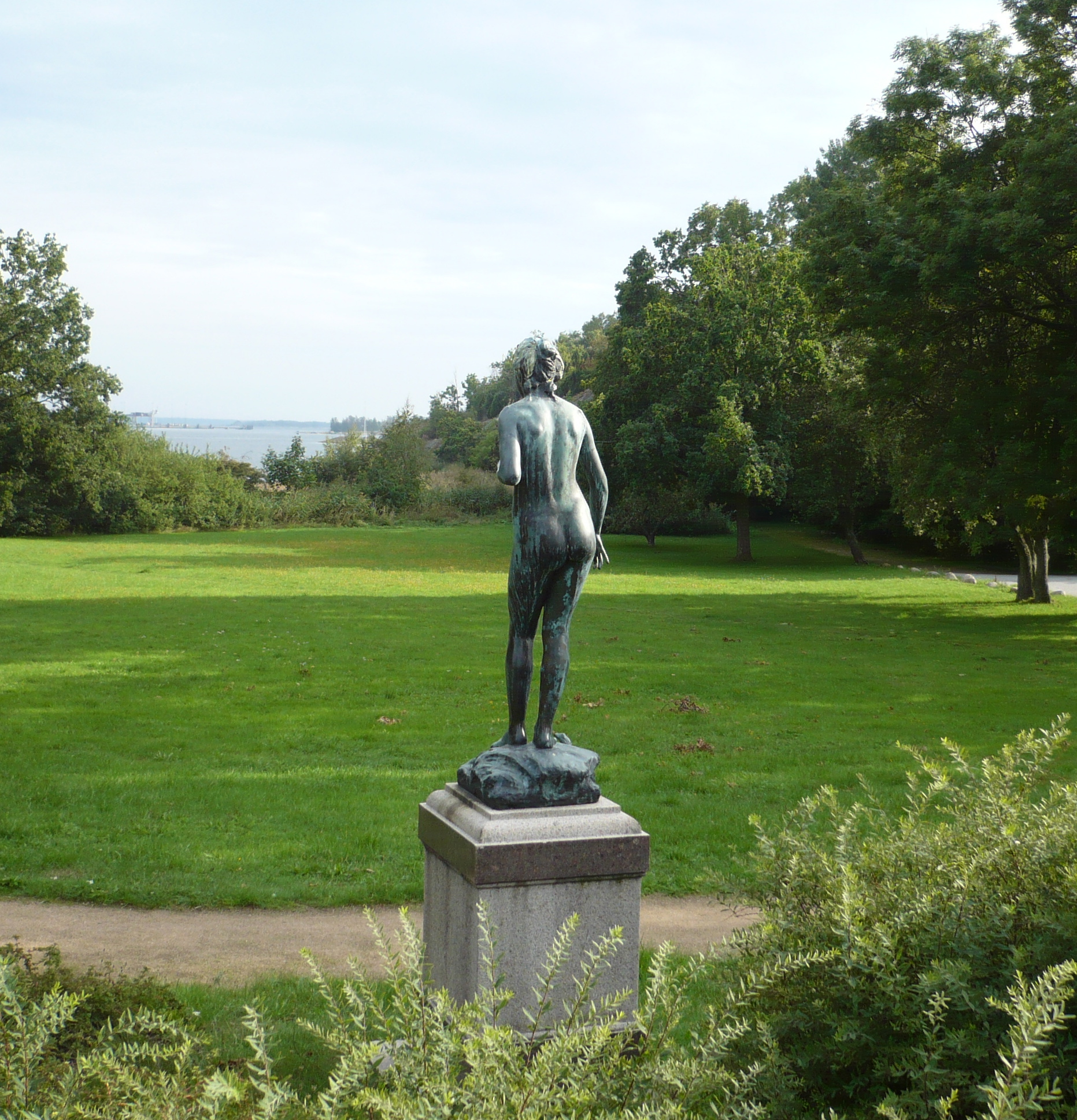 Vågens tjusning (franska: Attrait de la Vague) är en skulptur av en flicka som osynligt spelar på näckens harpa, ursprungligen utförd 1888 i gips av Per Hasselberg. Statyn är gjuten i brons 1920 och placerad vid Herrgårdsvägen på Hästö i Karlskrona.